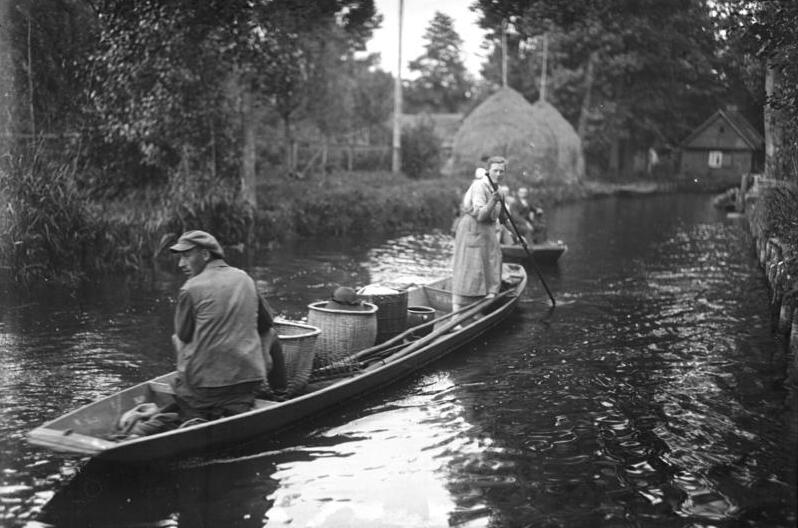 Wochenende im idyllischen Spreewald b/Berlin! Ein Spreewälder Gurkenbauer bringt seine Ware zum Markt.